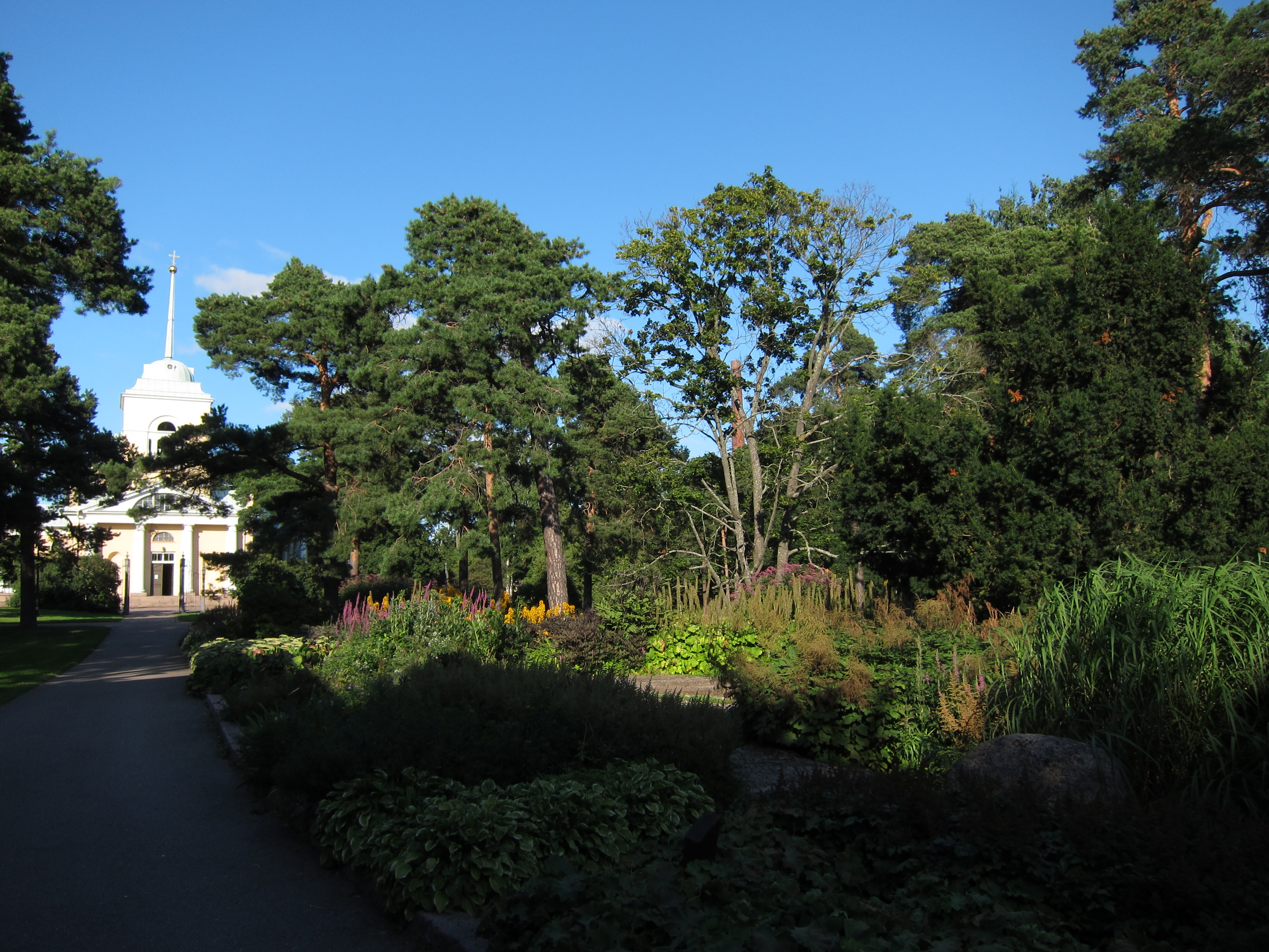 Isopuisto Kotkassa Kotkansaarella. Puistossa sijaitsee Kotkan ortodoksinen kirkko eli Pyhän Nikolaoksen kirkko.